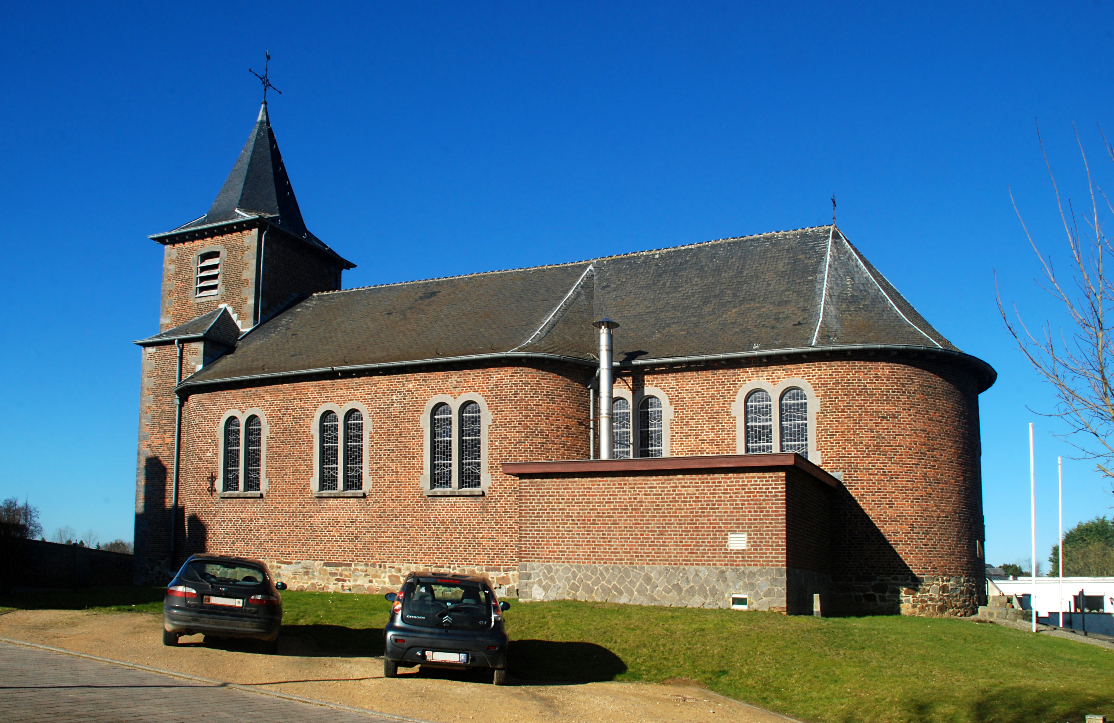 Belgique - Brabant wallon - Chastre - Cortil-Noirmont - Église Saint-Pierre de Noirmont